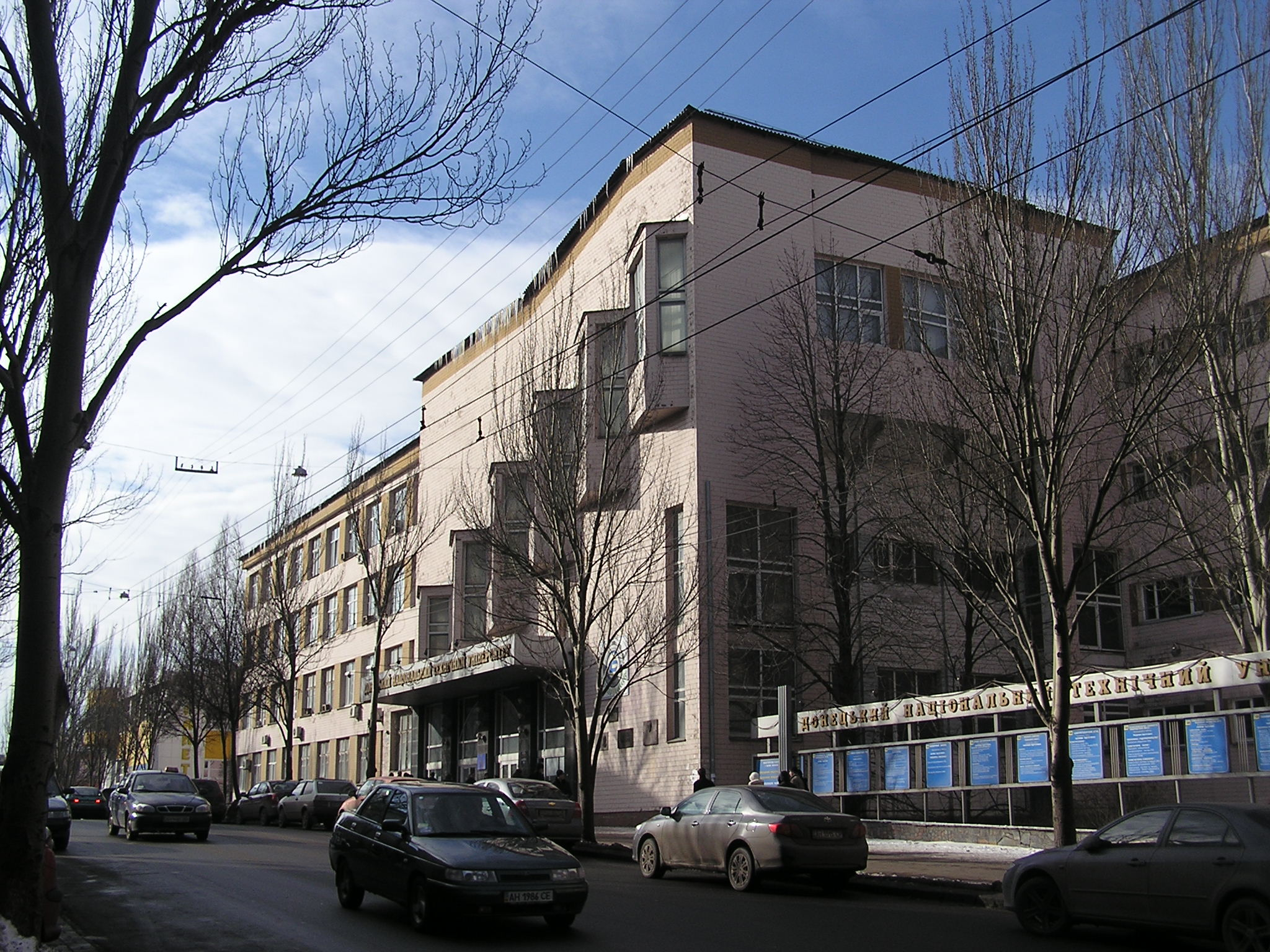 Первый корпус Донецкого национального технического университета